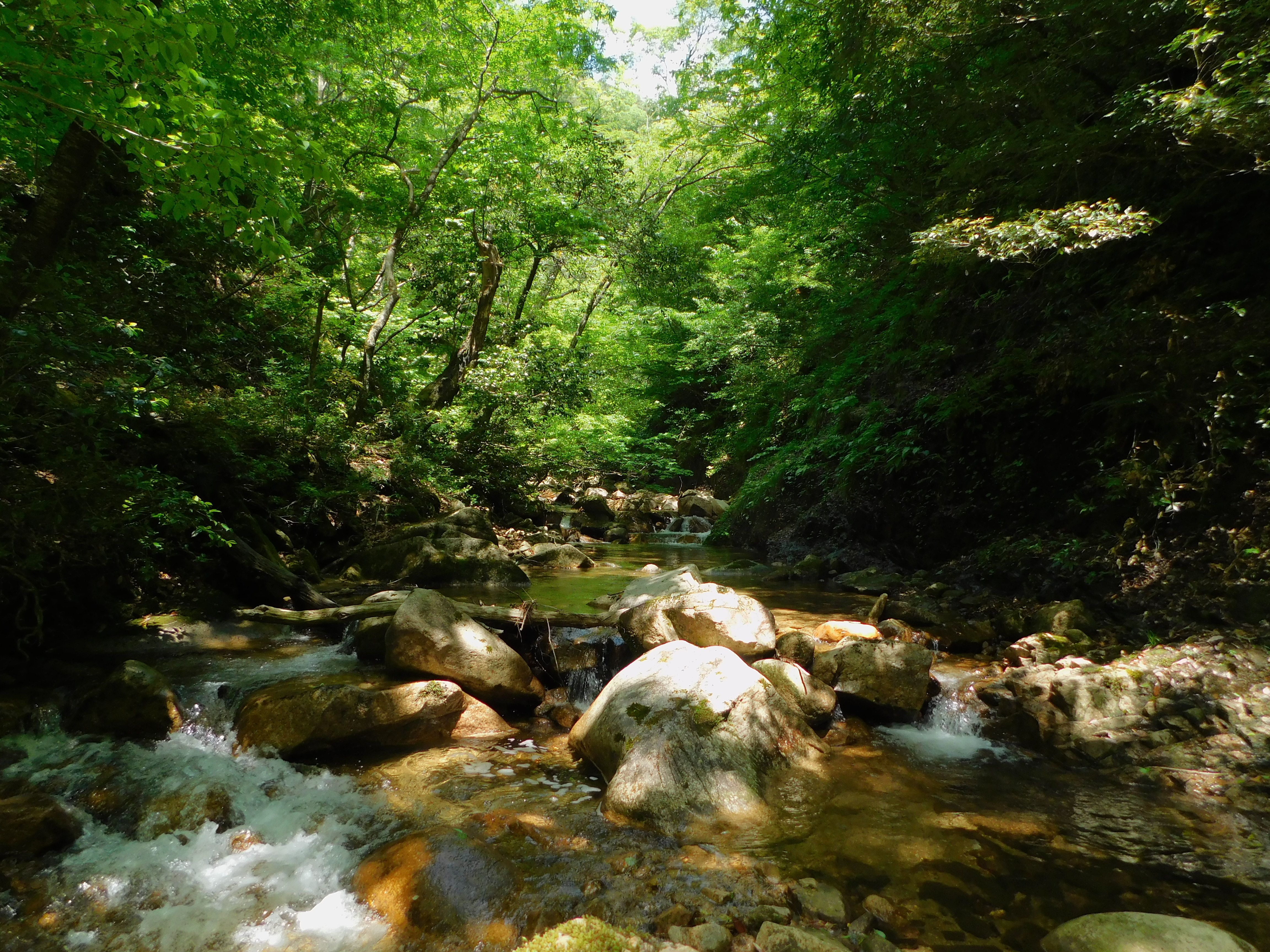 口無谷には滝が多くみられ、敦賀市最大の鬼ヶ滝もある。